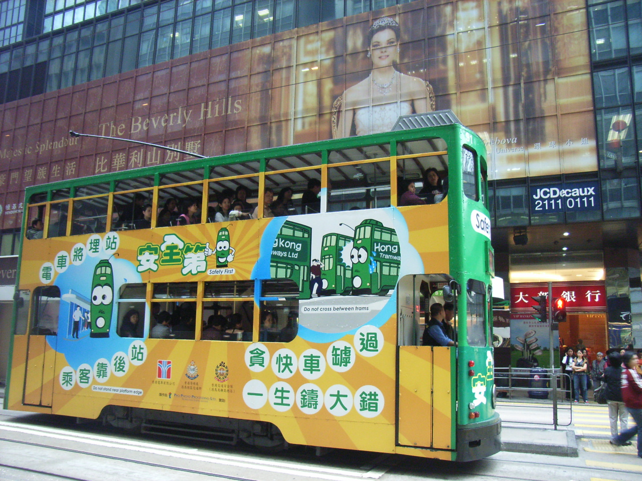 香港電車中環環球大廈畢打街車站.